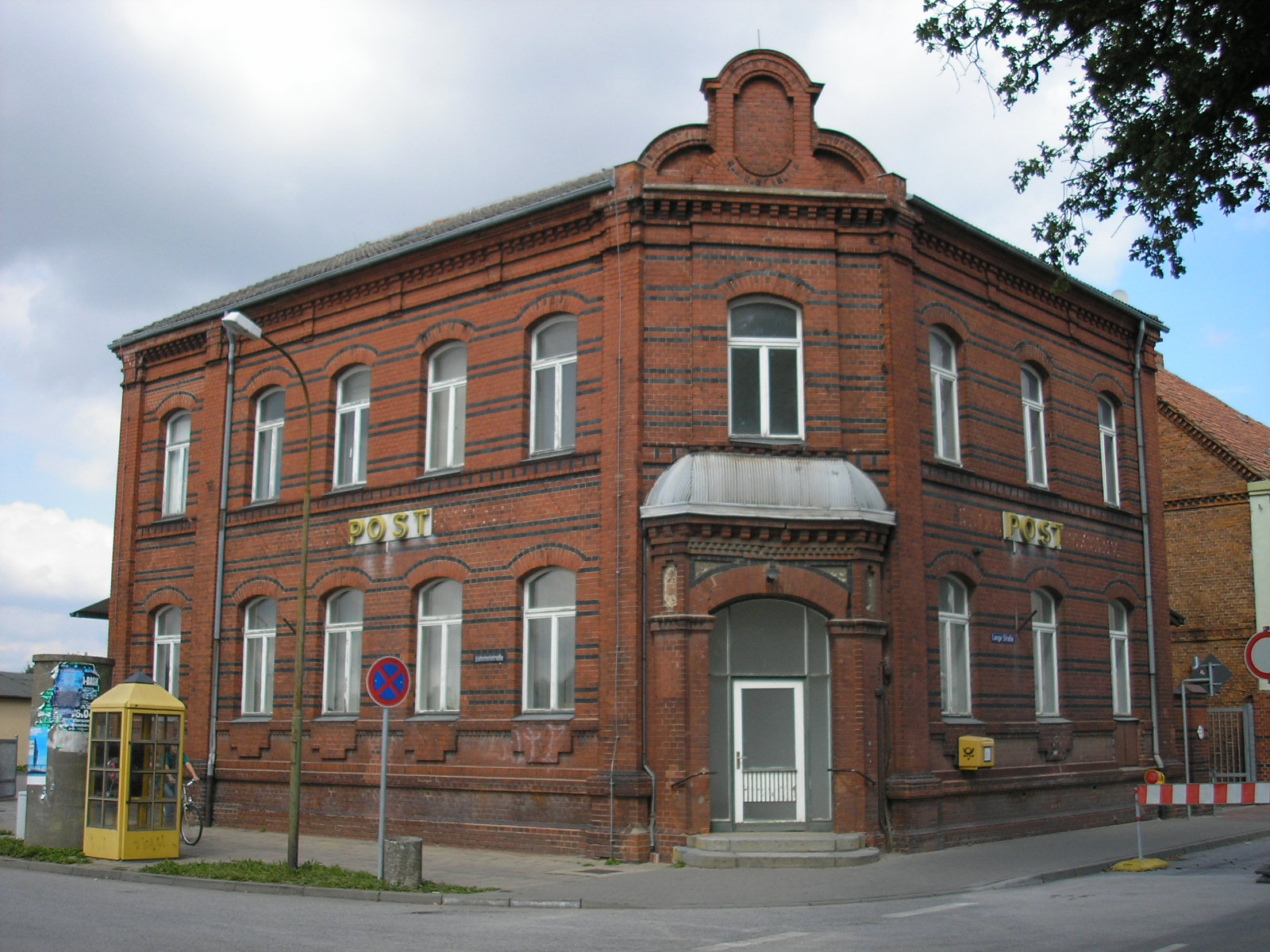 Post von Goldberg (Mecklenburg).